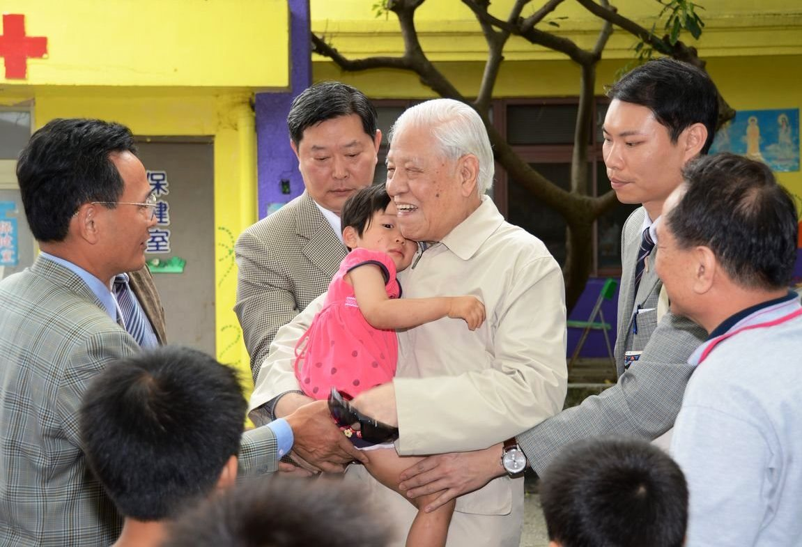 中華民國前總統李登輝訪問桃園縣大園鄉弘化育幼院